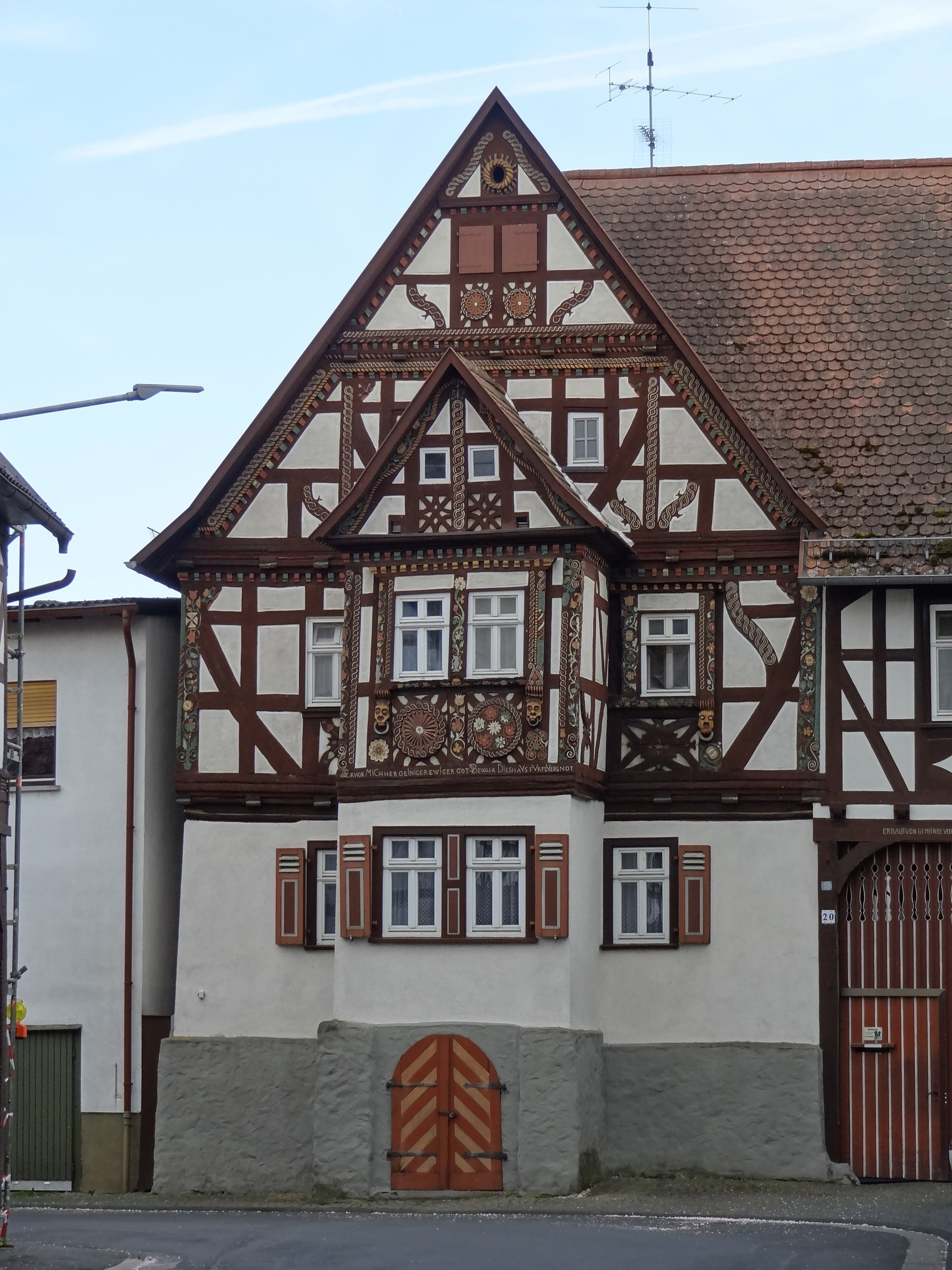 Ohlysches Haus